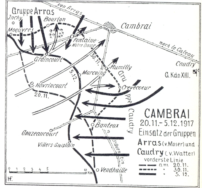 Karte seite 70: Cambrai 20.11.-5.12.1917